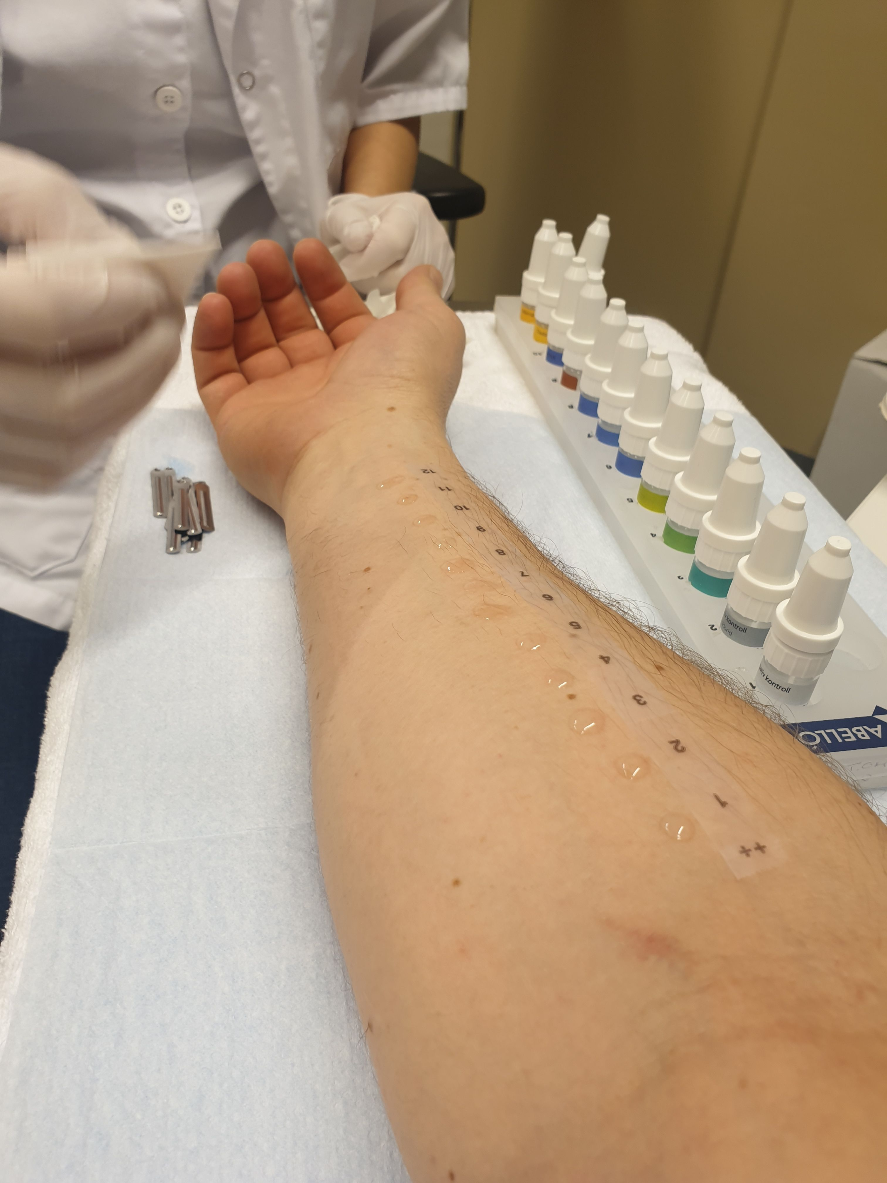 Genomförande av pricktest för att testa allergener.